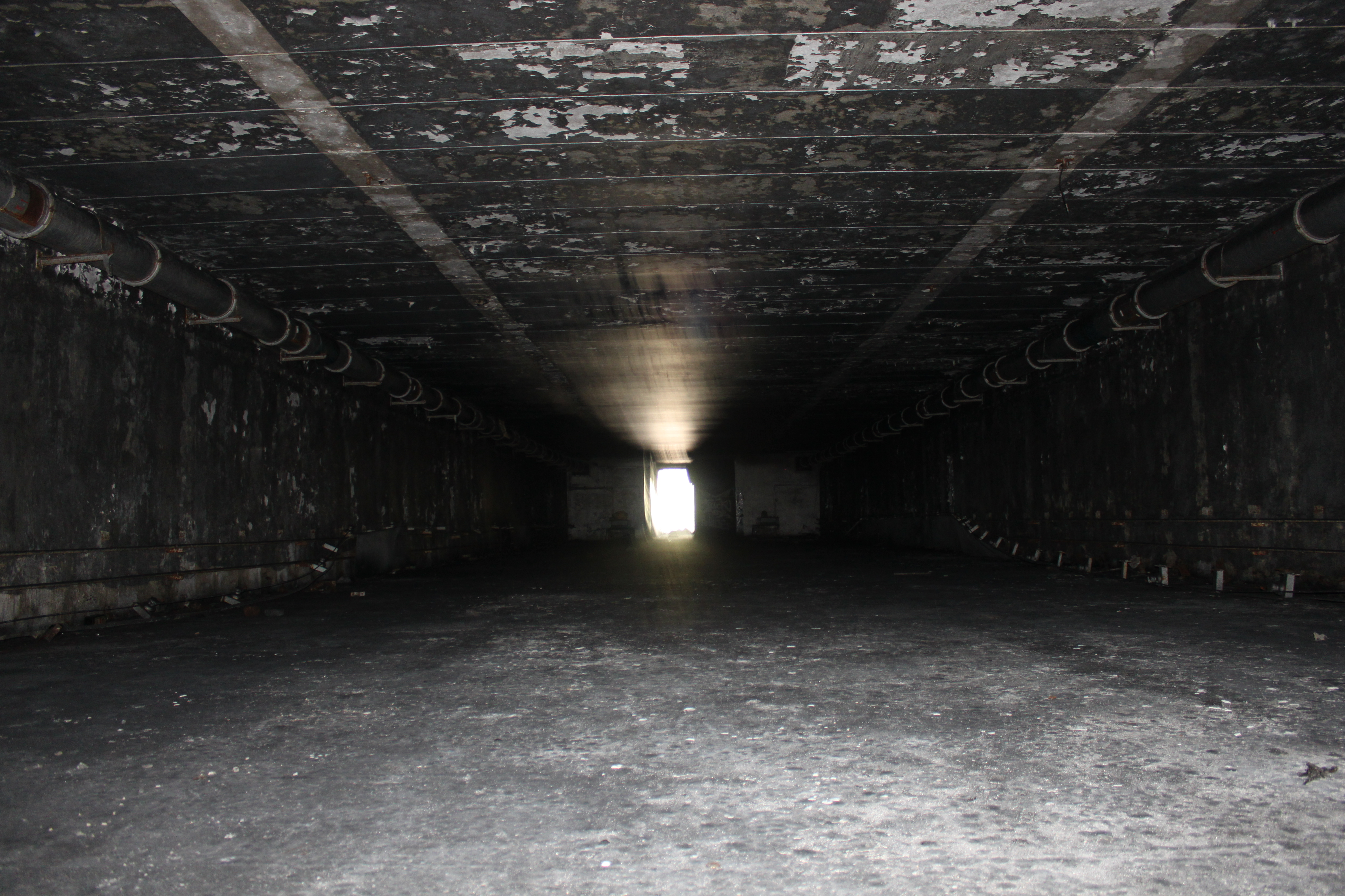 Das ehemalige Sonderwaffenlager der GSSD für nukleare Freifallbomben in Finsterwalde. Zustand 2010, durch Vandalismus und Müllbrand stark zerstört.